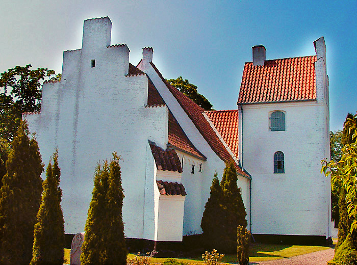 fra nordøst